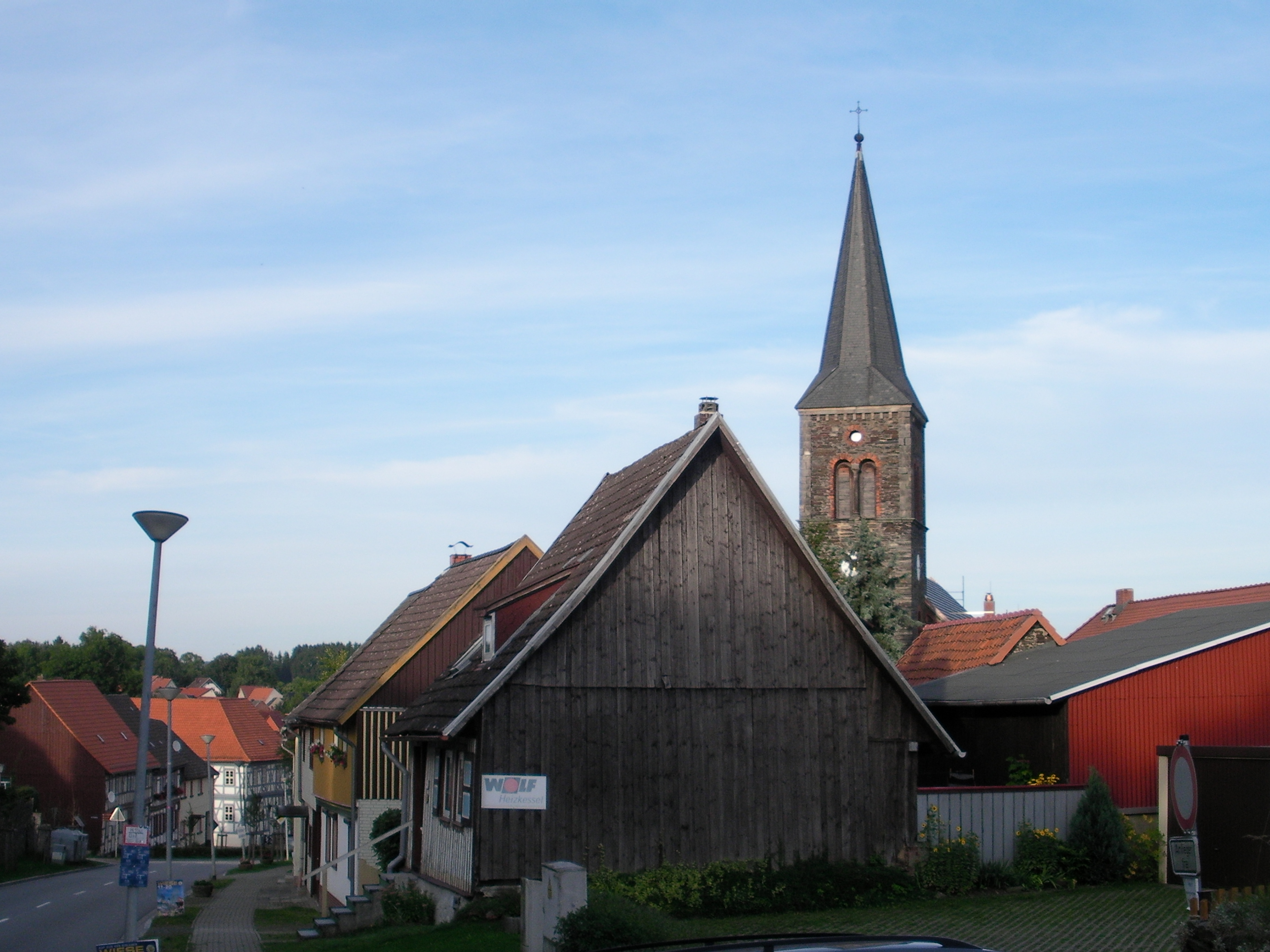 Güntersberge (Harz), Blick zur Kirche